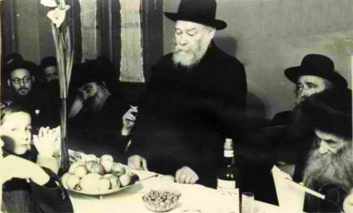 הרב שמואל יצחק הילמן נואם בעמידה. מימינו יושבים הרב יחזקאל אברמסקי והרב איסר זלמן מלצר, משמאלו הרב יעקב חנוך (העניך) סנקביץ' (ראש ישיבת "שפת אמת") והרב צבי (הירשל) יהודה מלצר מרחובות ומאחור ברקע הרב אברהם ורנר מנתניה.